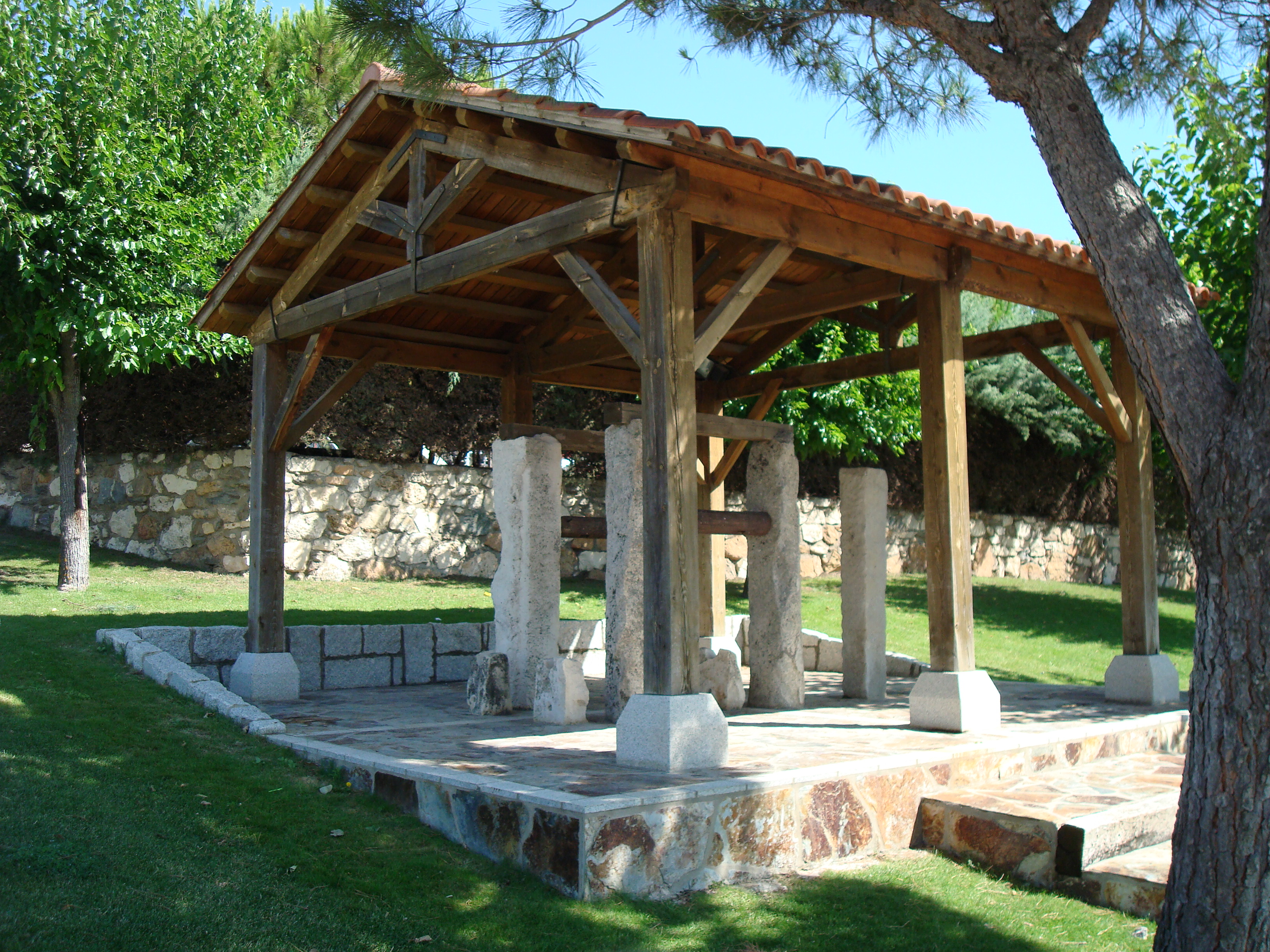 Potro de herrar animales del municipio de Venturada, ya restaurado.